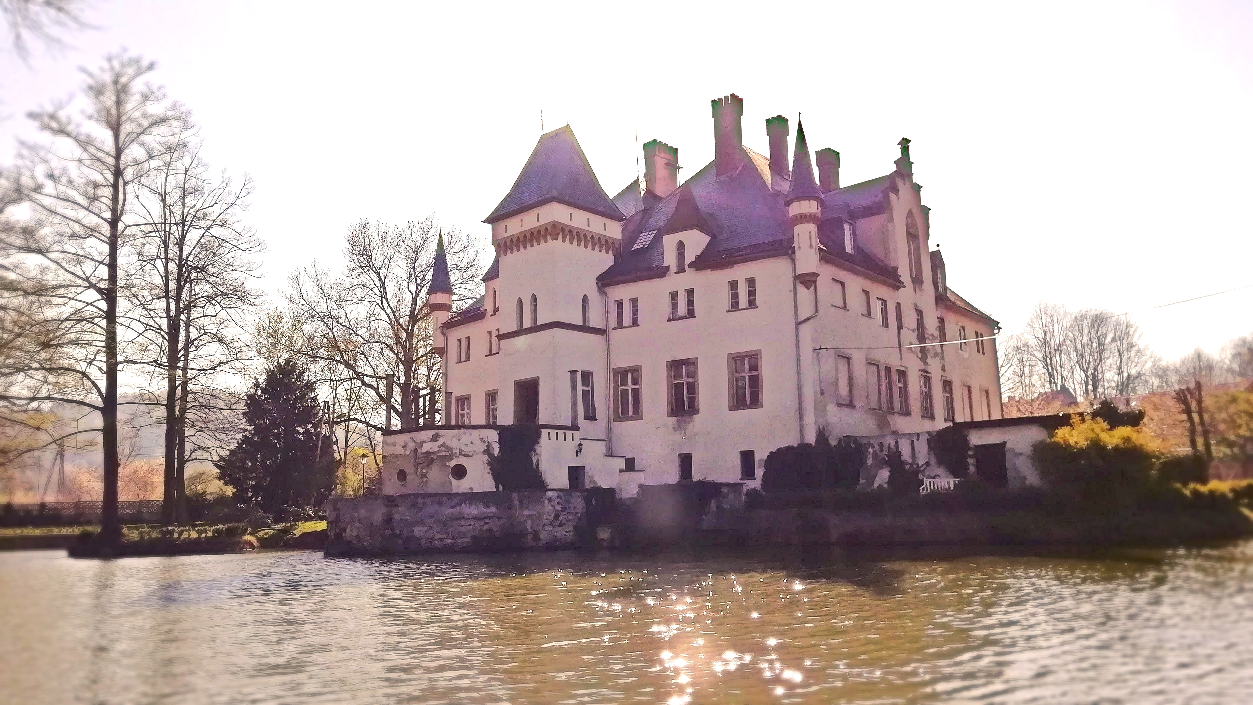 Dwór, Pałac dolny w Wojcieszowie